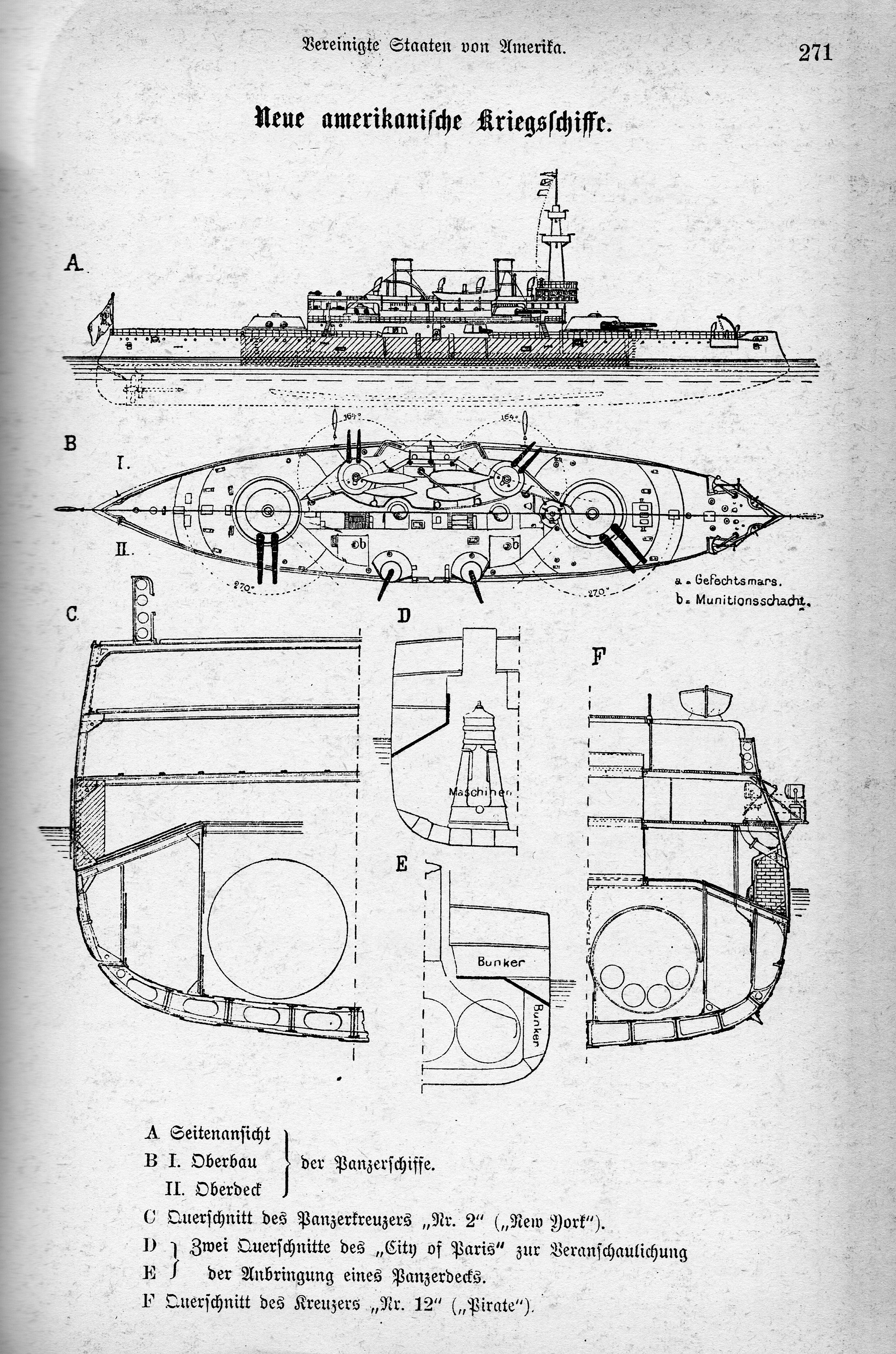 Panzerkreuzer USS NEW YORK, Abbildung aus der Marine-Rundschau, Jahrgang 1890